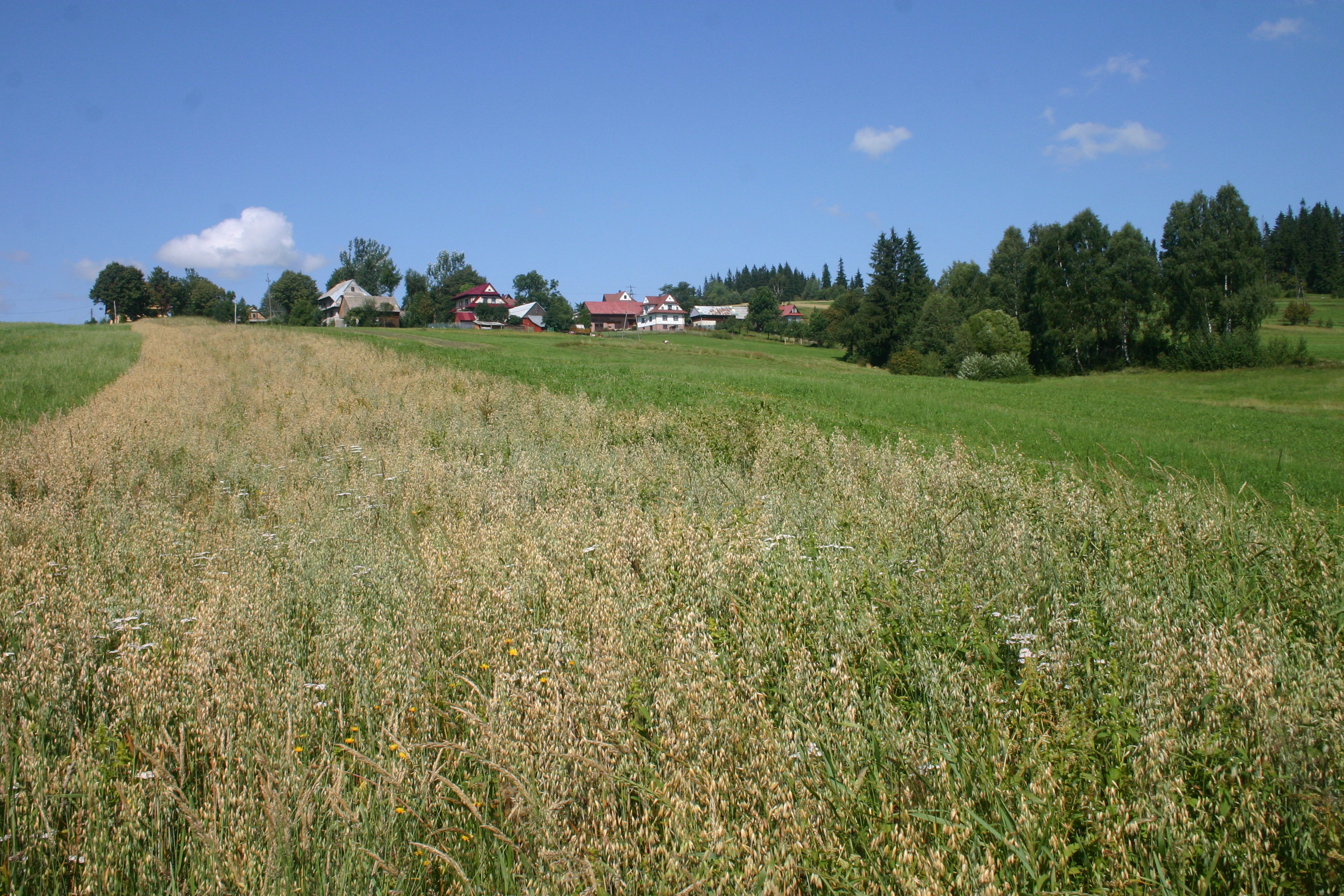 pole w Pyzówce